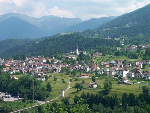 Foto proveniente dalla wikipedia in lingua friulana, :fur:Figure:Davar.jpg.